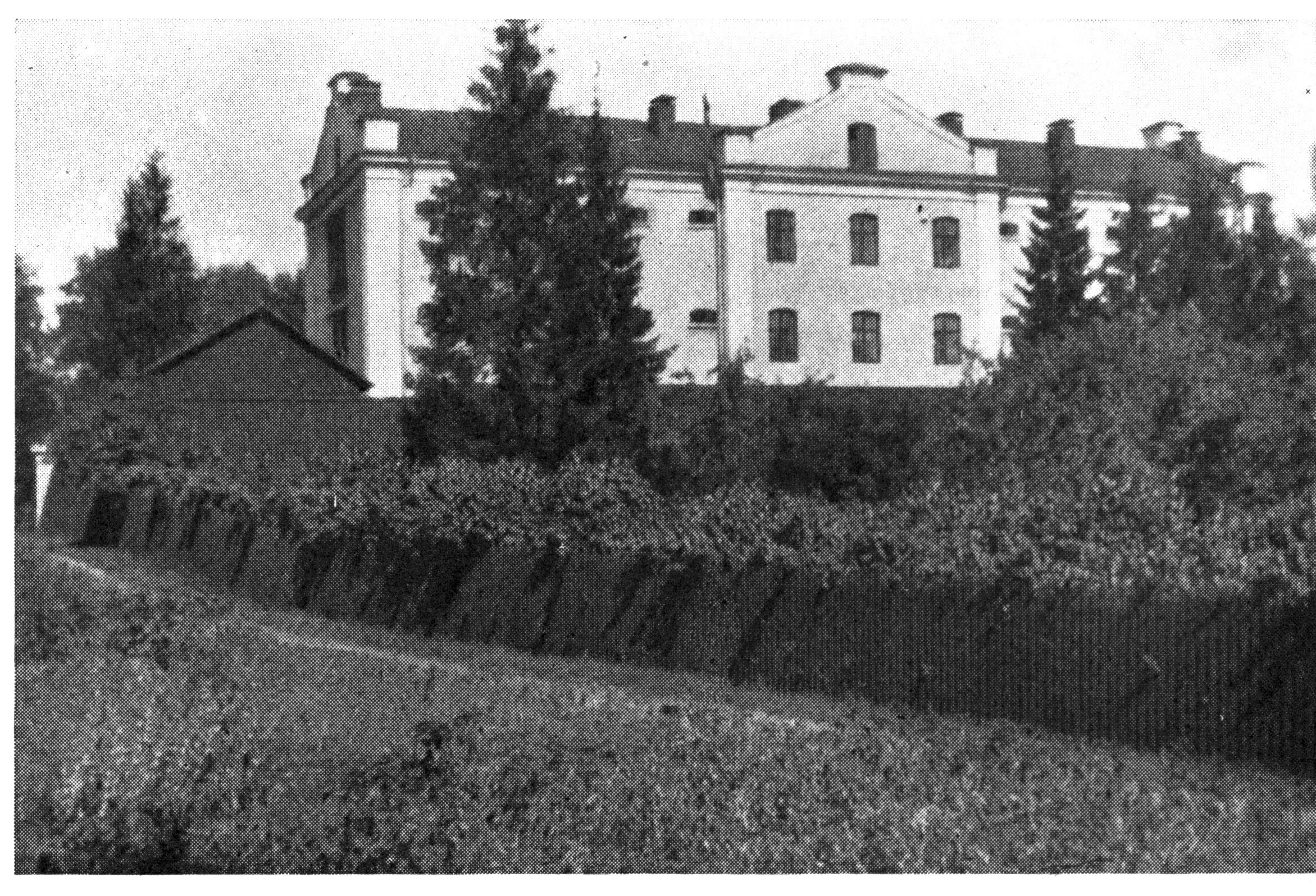 Länsfängelset i Västerås